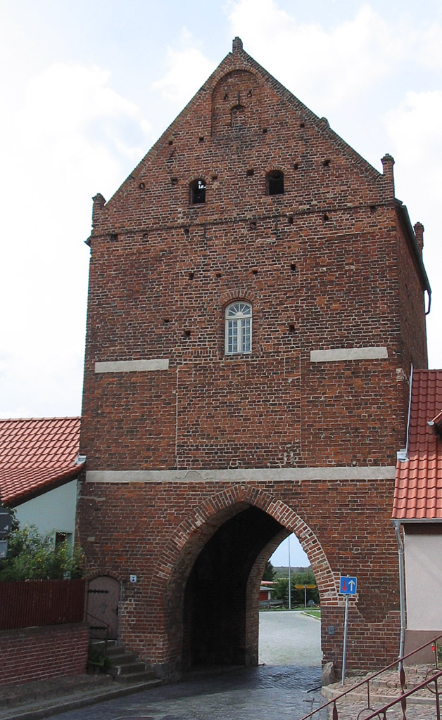 Beschreibung: Tribsees - Mühlentor Fotograf: Darkone, 23. August 2004